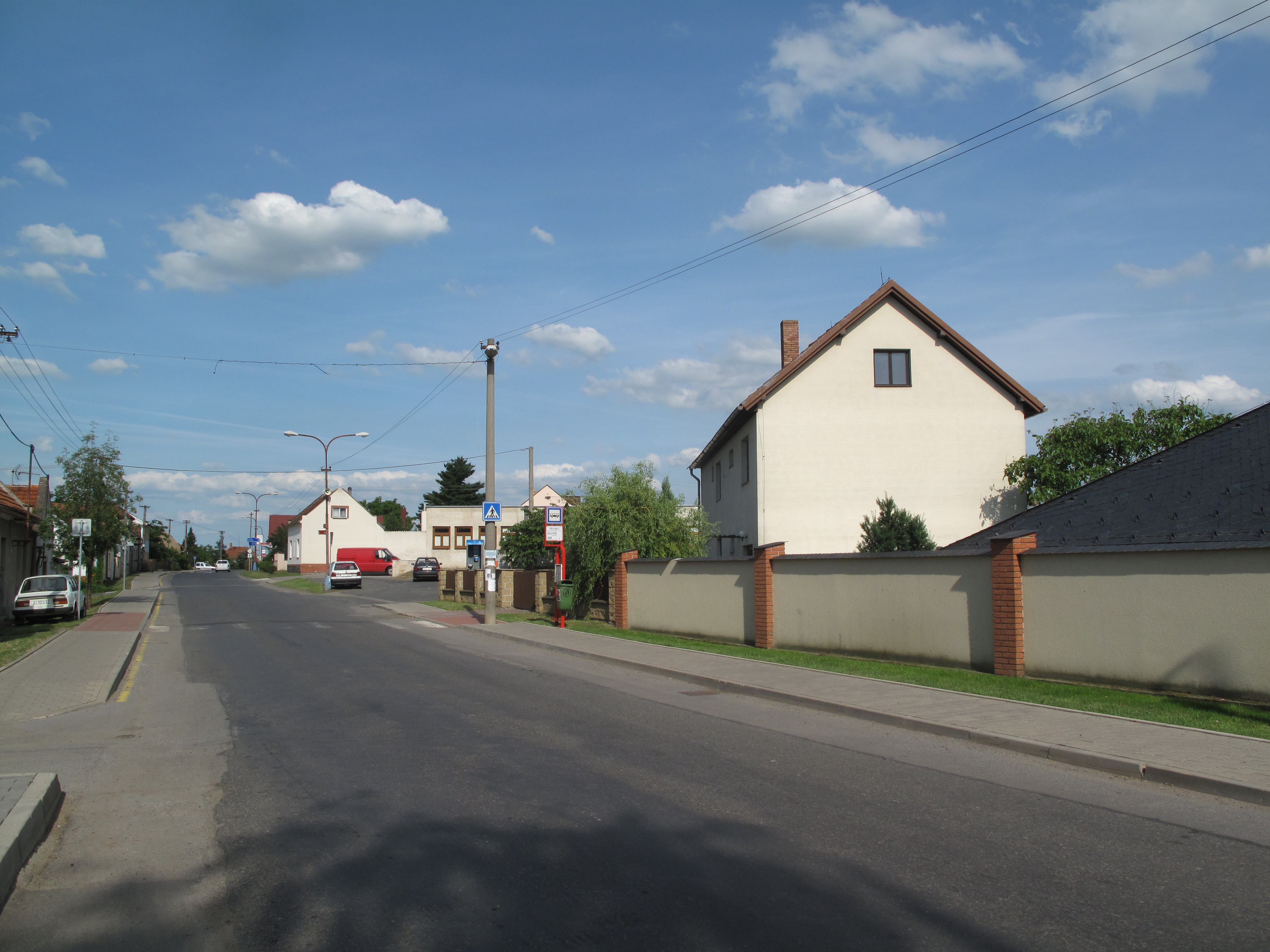 Předboj